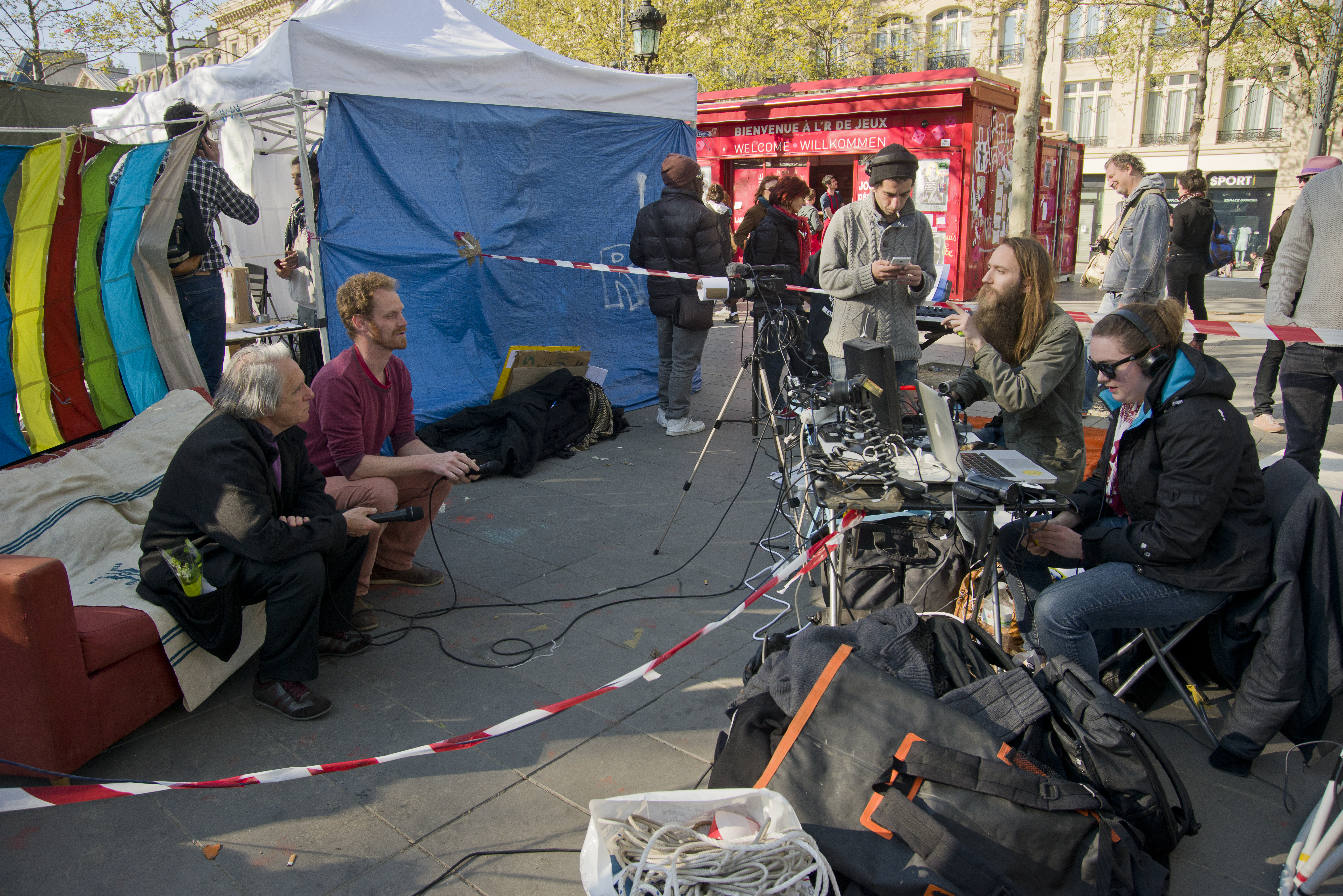 Rassemblement "Nuit Debout" à Paris le 62 mars.